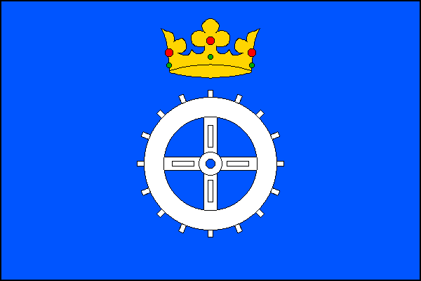 vlajka,Zvole , okres Žďár nad Sázavou